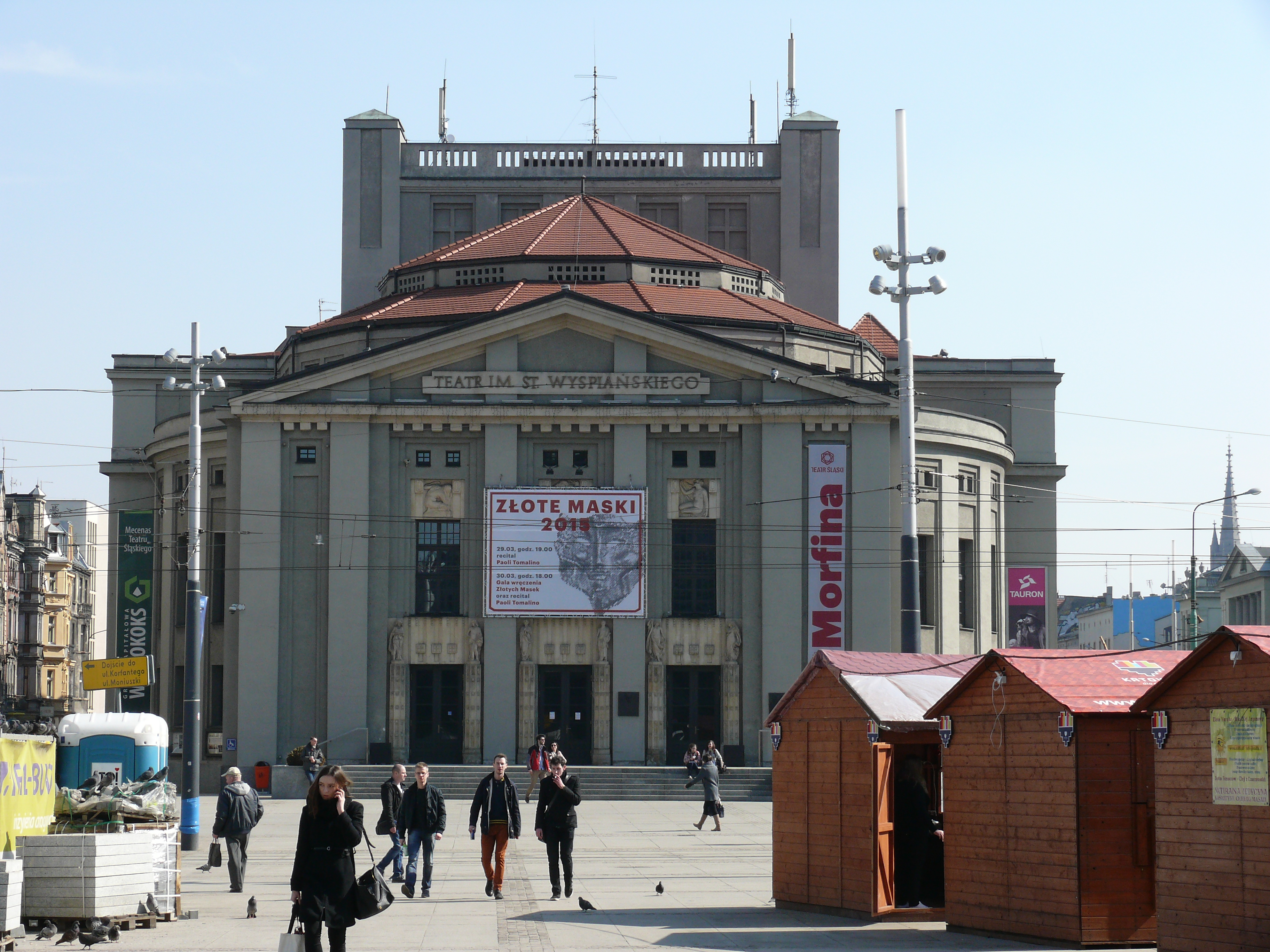 Das Schlesische Theater auf dem Rynek in Katowice.